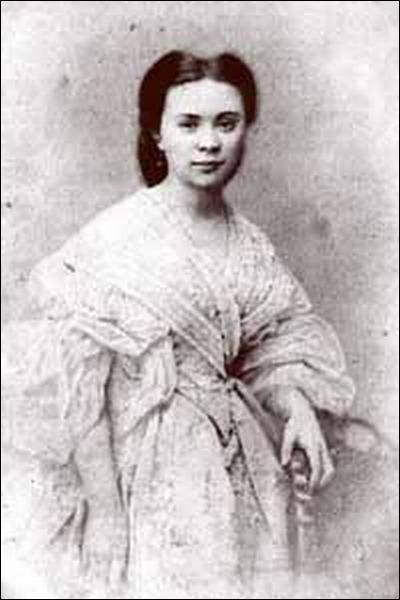 Ольга Смирнитская / Category:Olga Smirnitskaya